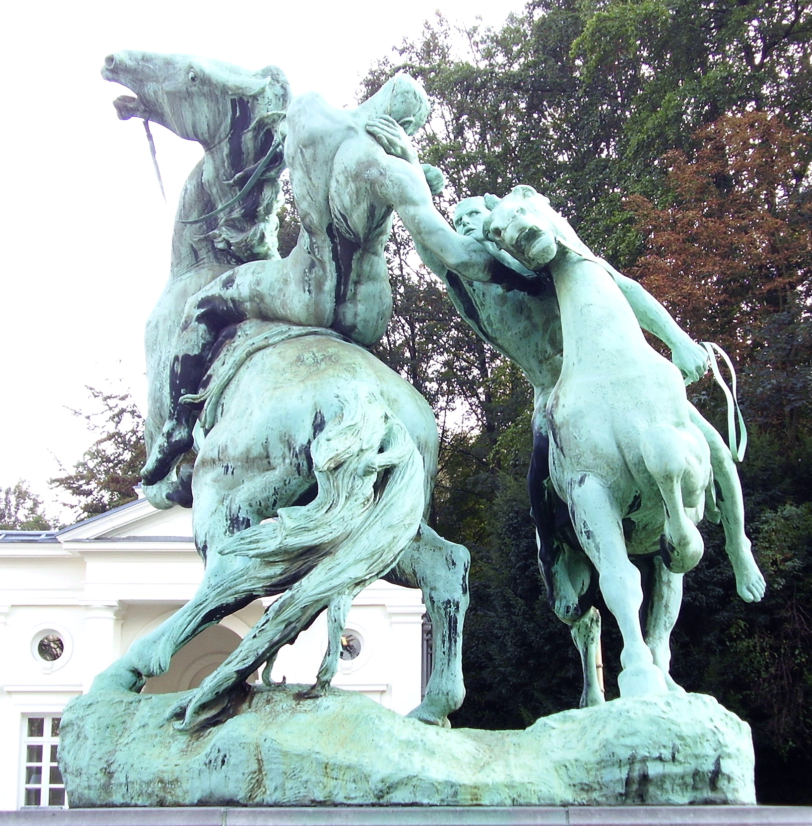 La Lutte équestre ou Le combat des cavaliers (1899 - 1909) de Jacques de Lalaing, entrée du bois de la Cambre à Bruxelles